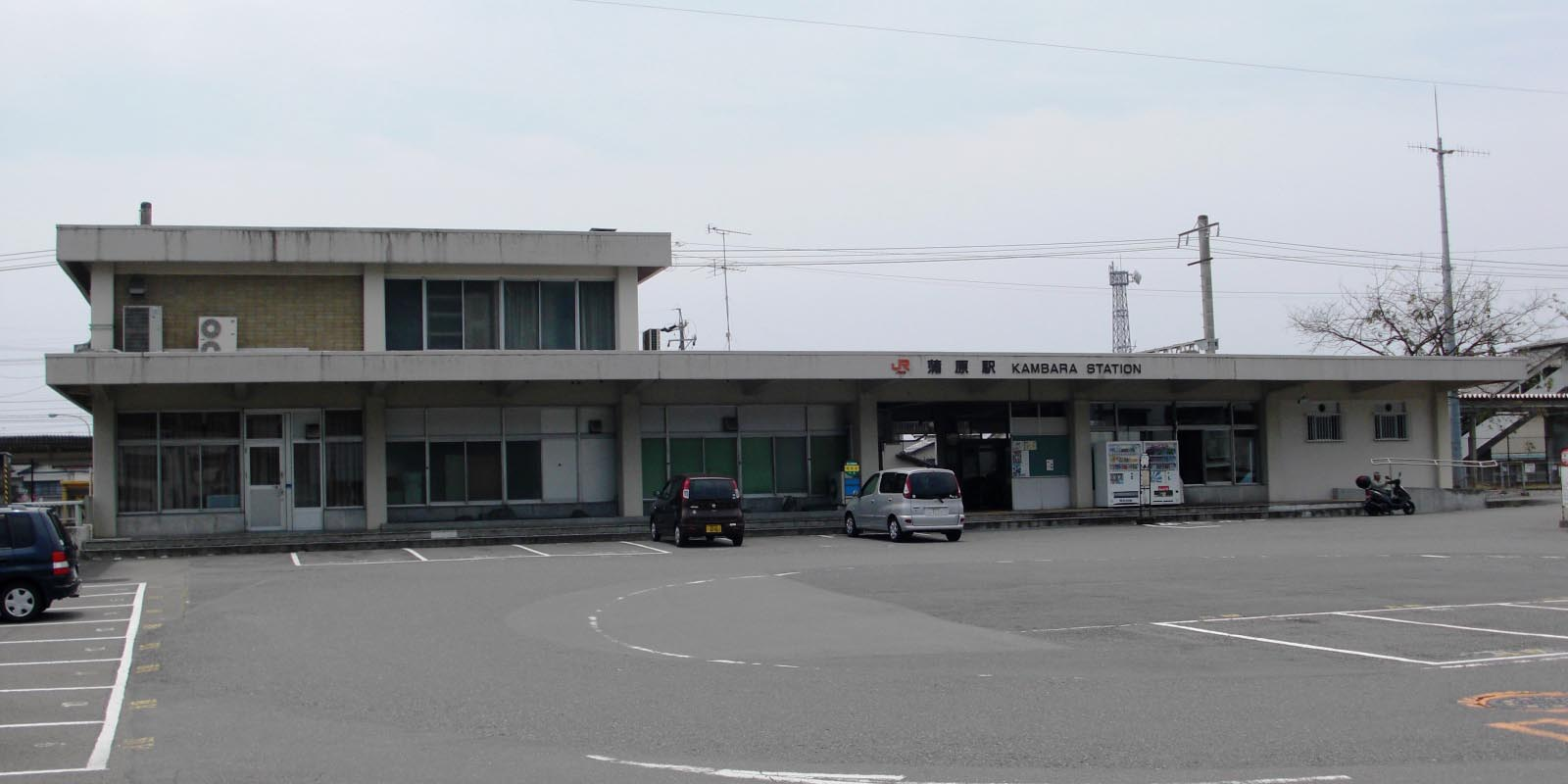 静岡市清水区蒲原堰沢、JR東海 蒲原駅駅舎